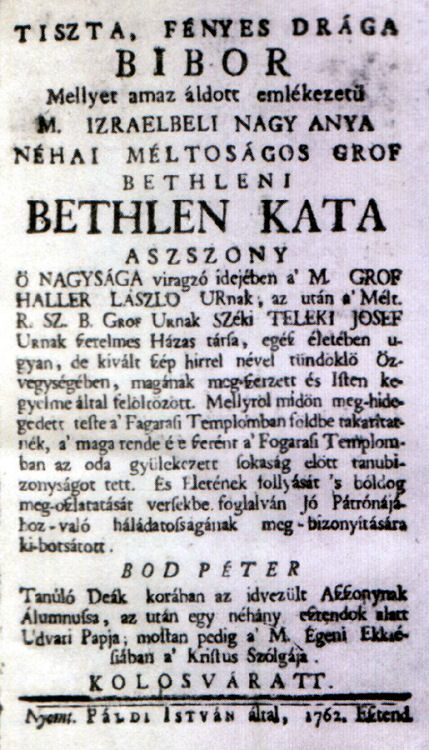 Bod Péter „Tiszta, fényes drága bíbor” (Bethlen Kata verses búcsúztatója) című művének egy lapja. Kolozsvár, 1762